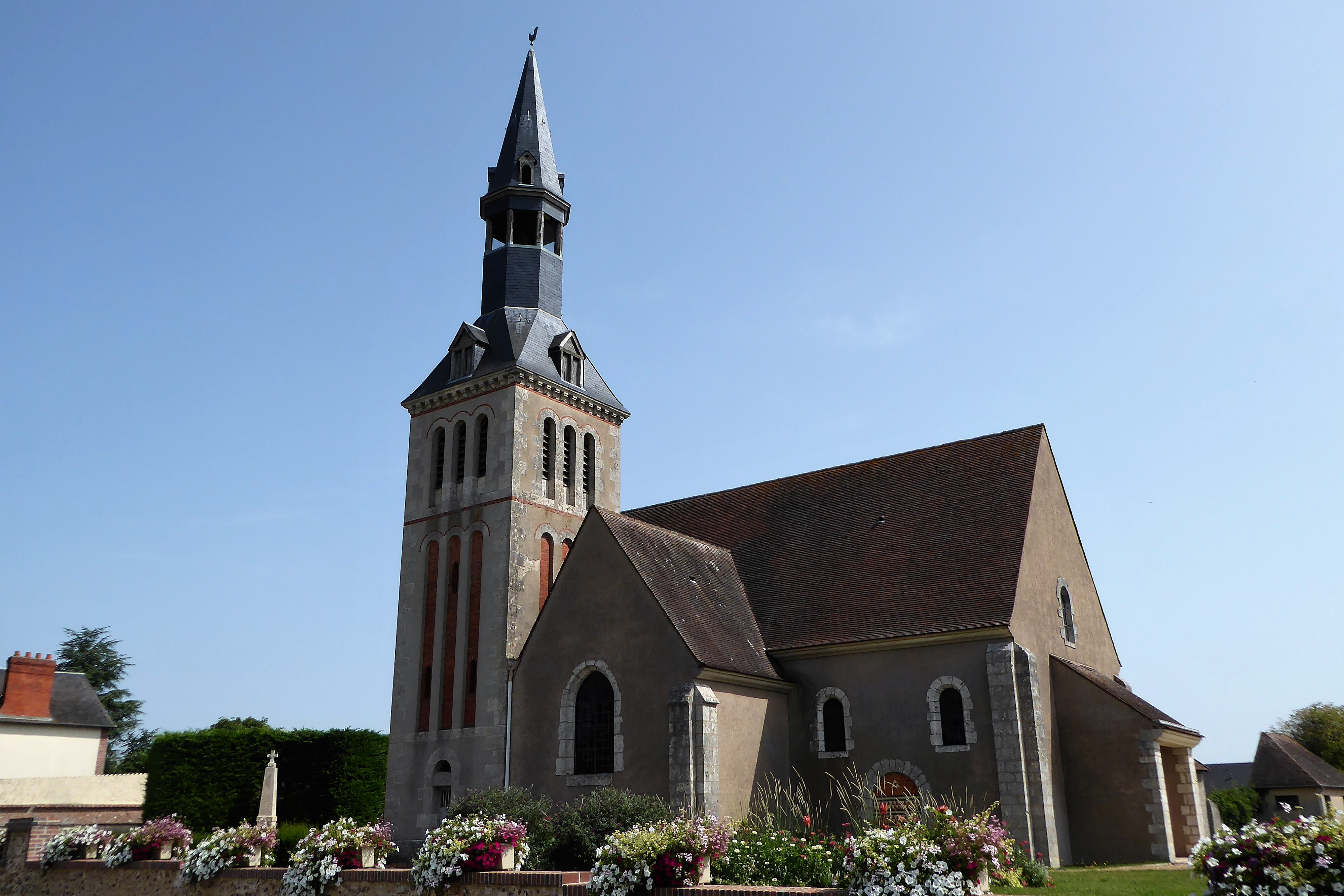 église Saint-Denis, Champhol, Eure-et-Loir (France).